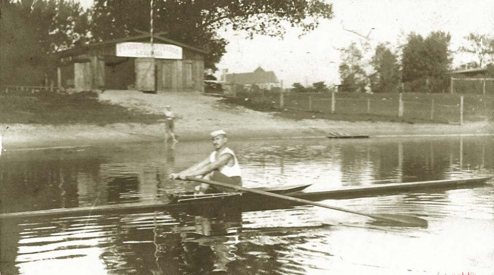 Niemiecki (najprawdopodobniej) wioślarz na jedynce na Warcie w Poznaniu. W tle przystań Posener Ruderverein Germania. Zdjęcie zrobione przed 1909 rokiem - nie wybudowano jeszcze kąpieliska przed klubem.